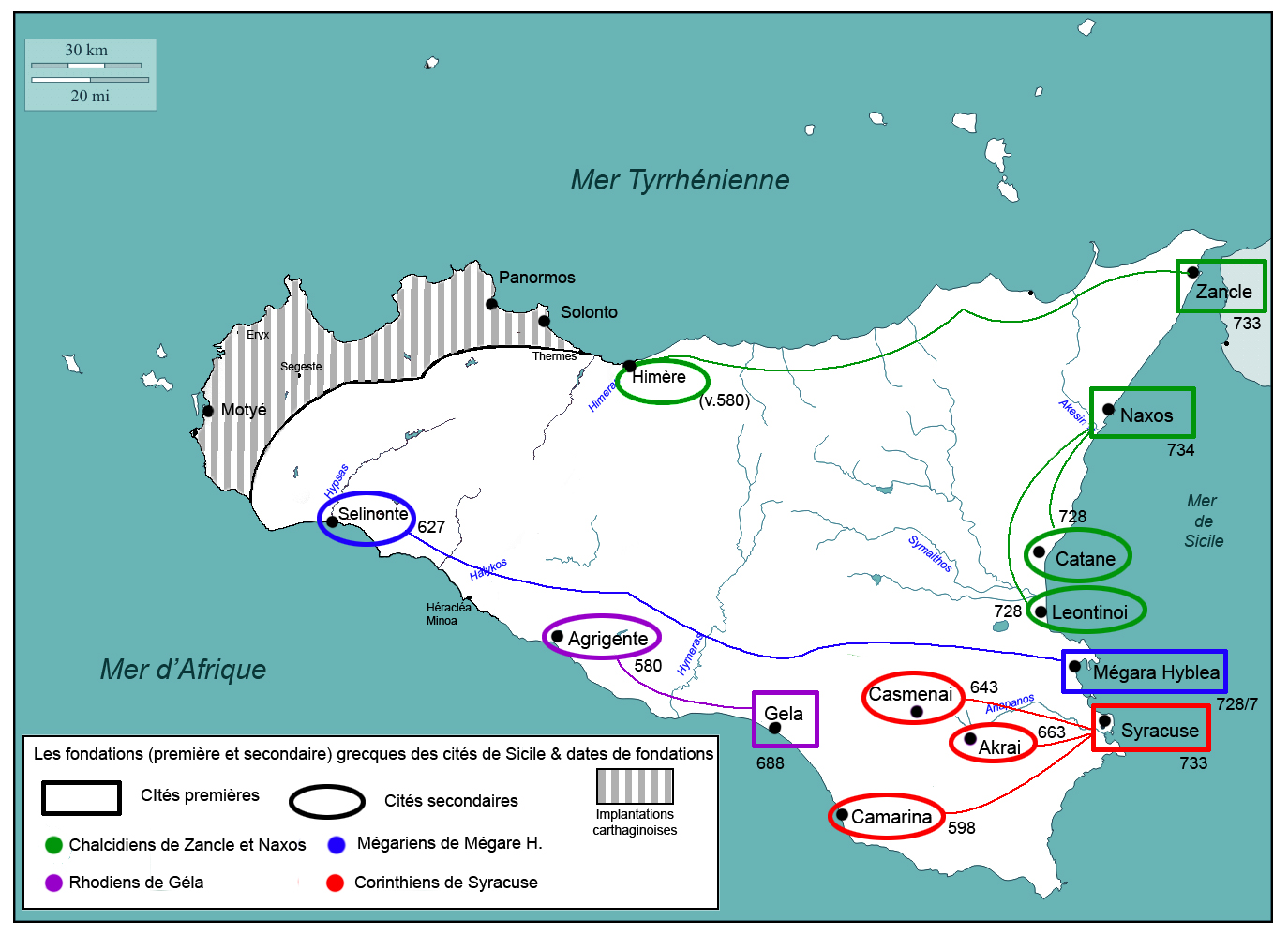 Les fondations grecques (premières et secondaires) des cités de Sicile & dates de fondations. La chronologie est celle retenue en général pour la fondation des cités de Sicile. Elle est estimée par les historiens comme relativement fiable. Mais si l’on recroise avec l’archéologie, on remarque une marge d’erreur d’environ 20 ans. Pour Naxos, la datation archéologique nous donne une date de fondation aux environs de 750. Et les plus vieilles traces grecs retrouvée vers 756.